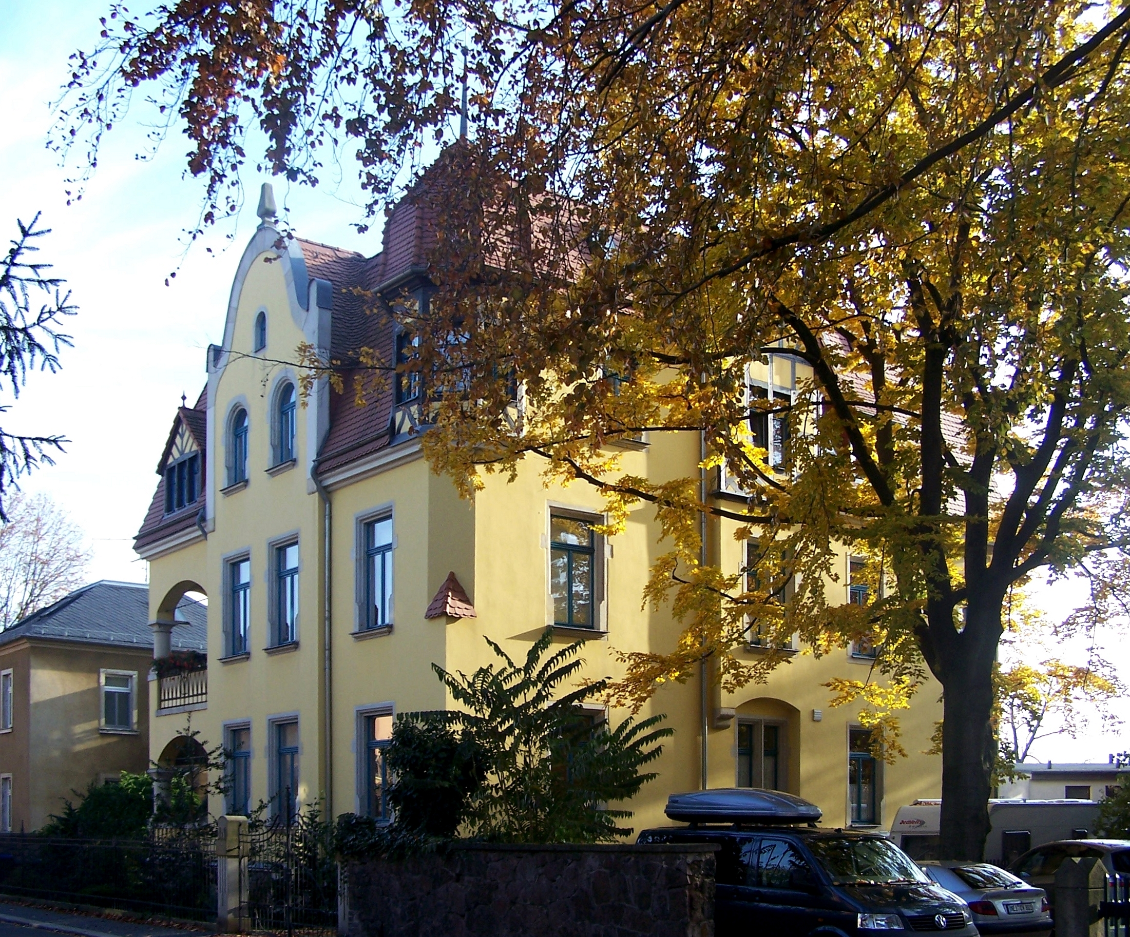 Wichernstr. 7 in Radebeul